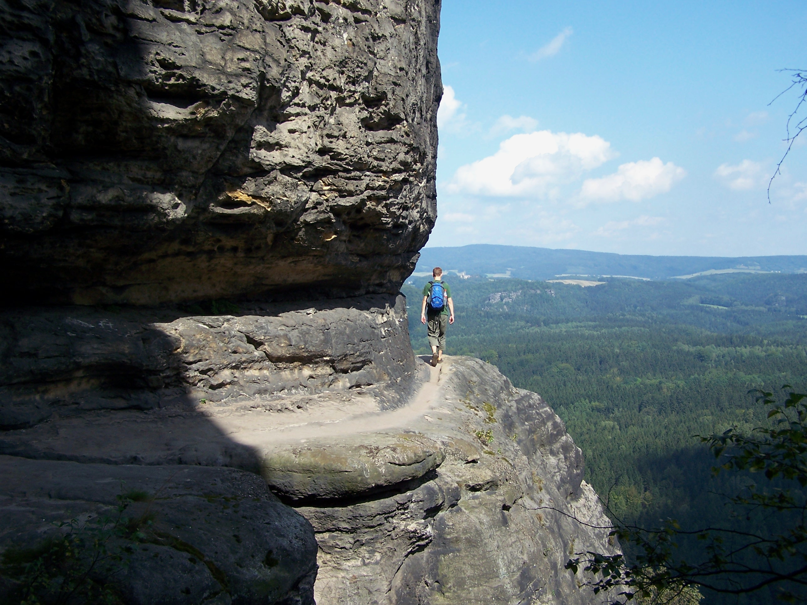 letztes Stück des Wegs zur Idagrotte von der Idagrotte aus, Affensteine, Sächsische Schweiz